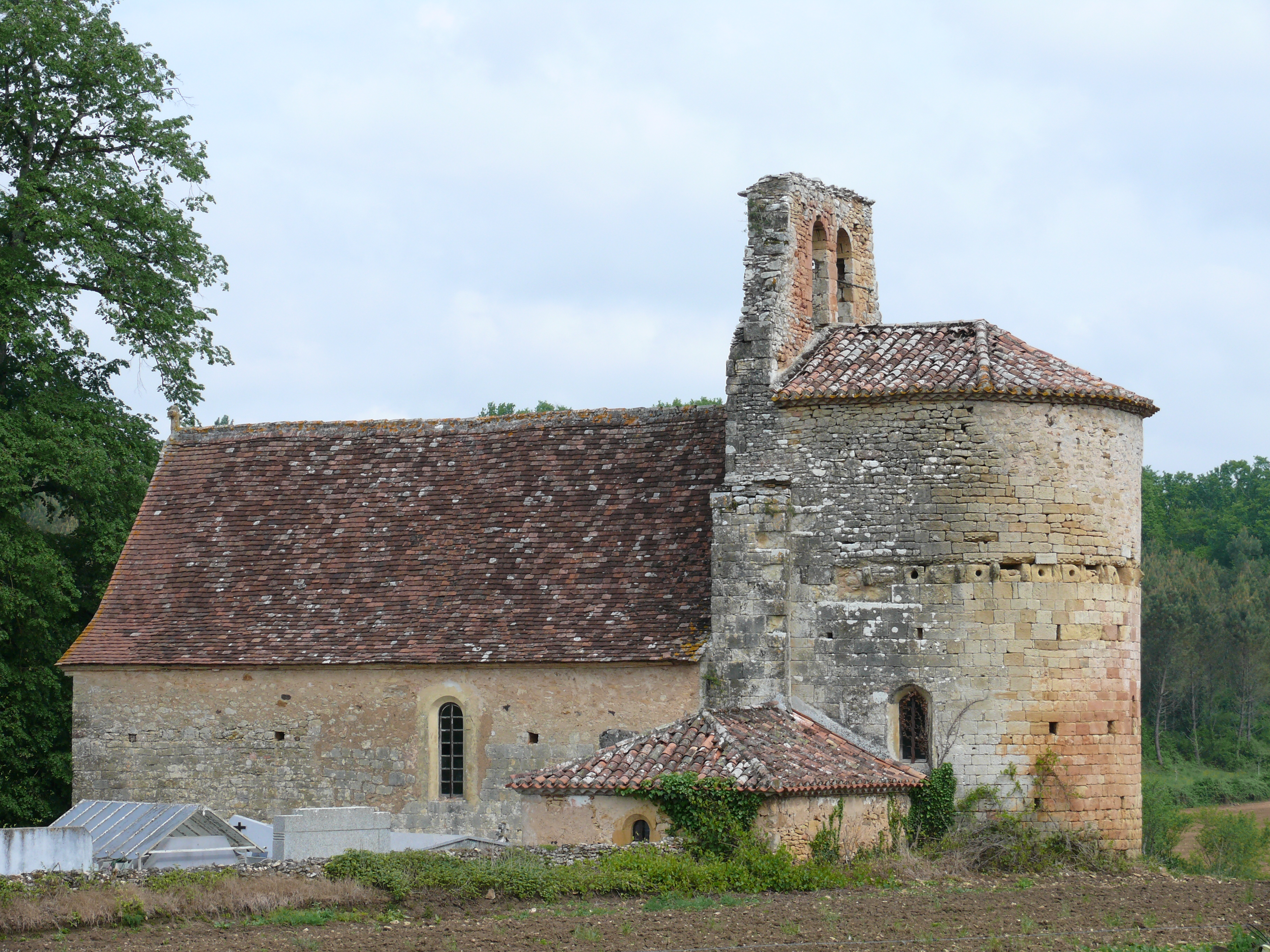 Saint-Marcory - Eglise -1